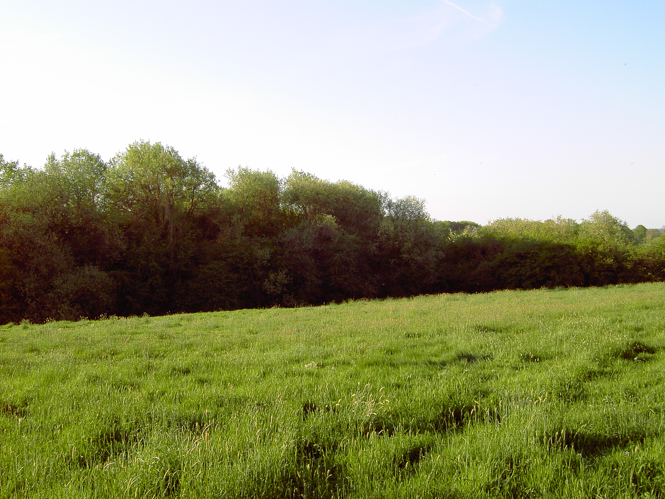 Blick auf das Naturschutzgebiet Schomet, Stolberg